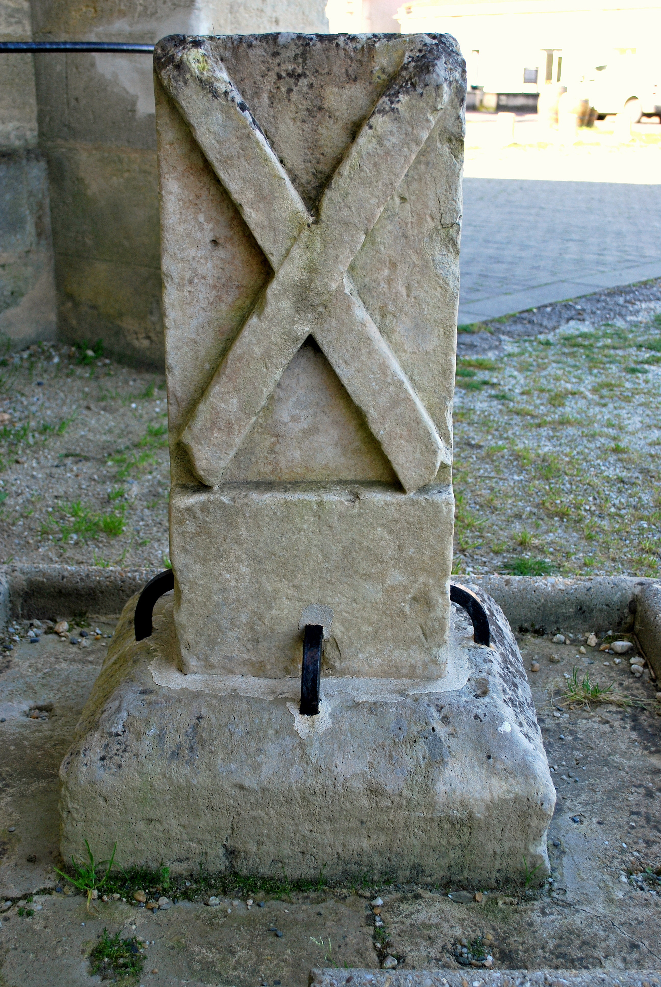 Cadaujac église Borne des pèlerins de St Jacques de Compostelle